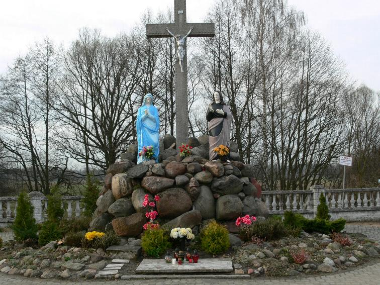 Cmentarz parafialny w Fosowskiem, Katholischer Friedhof in Vossowska